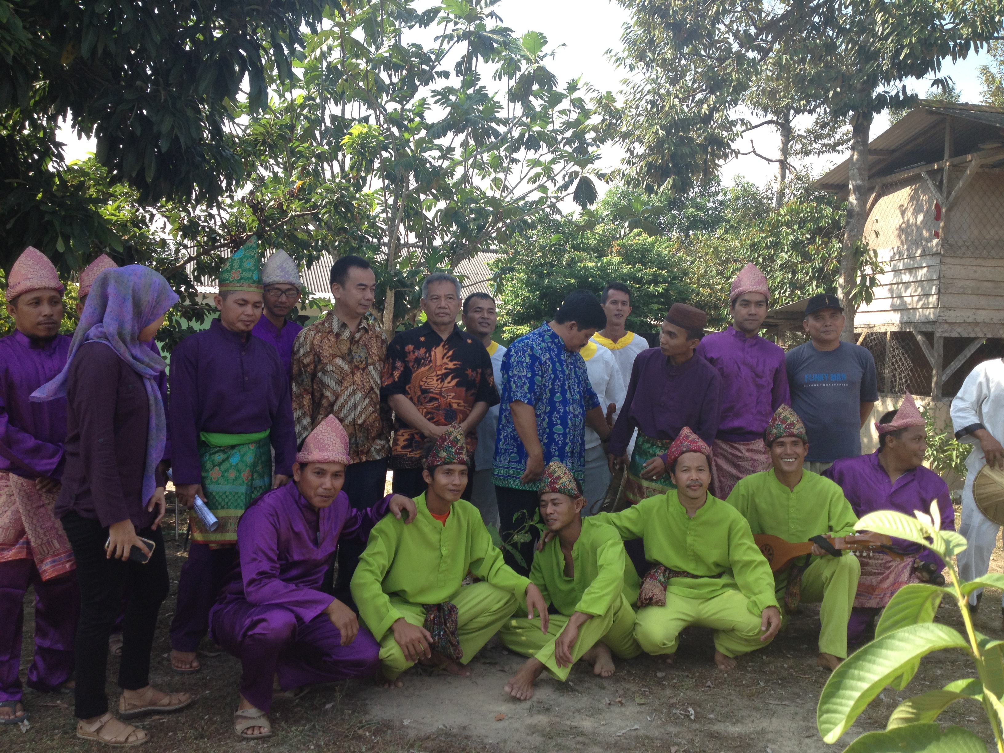 Kostum Kerito Surong